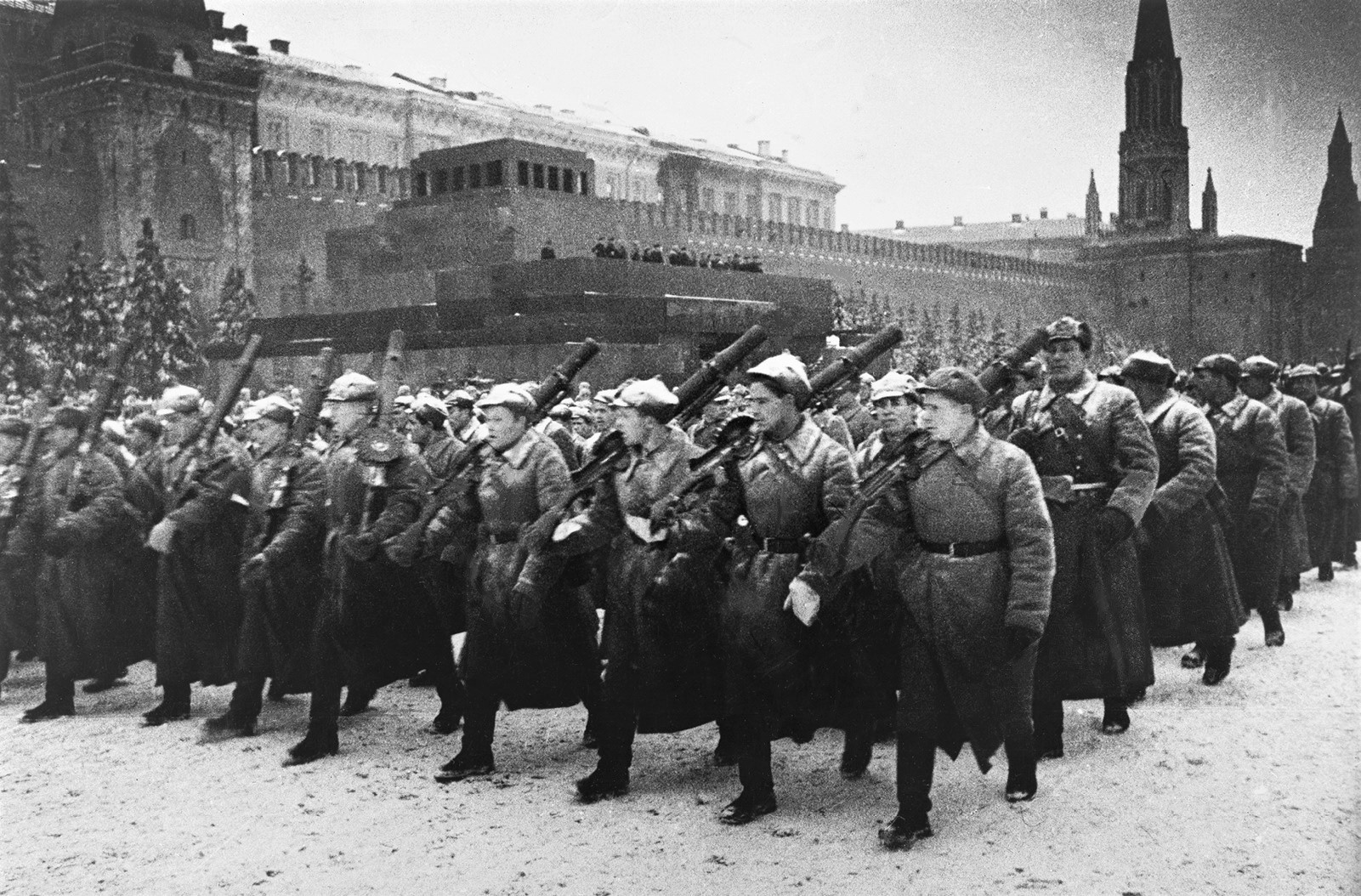 Парад а Красной площади 7 ноября 1941 года. Пулемётчики